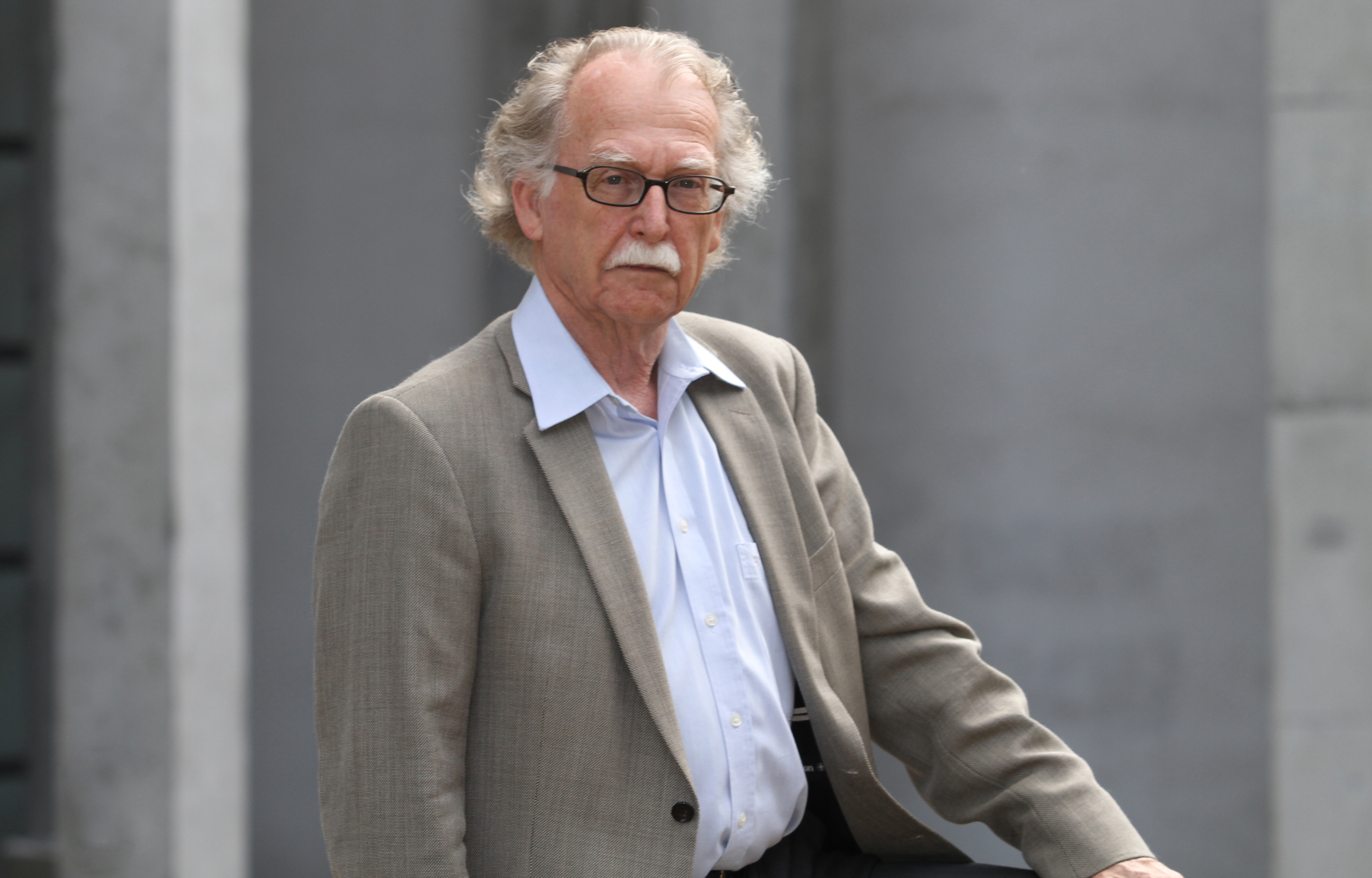 Urs A. Meyer